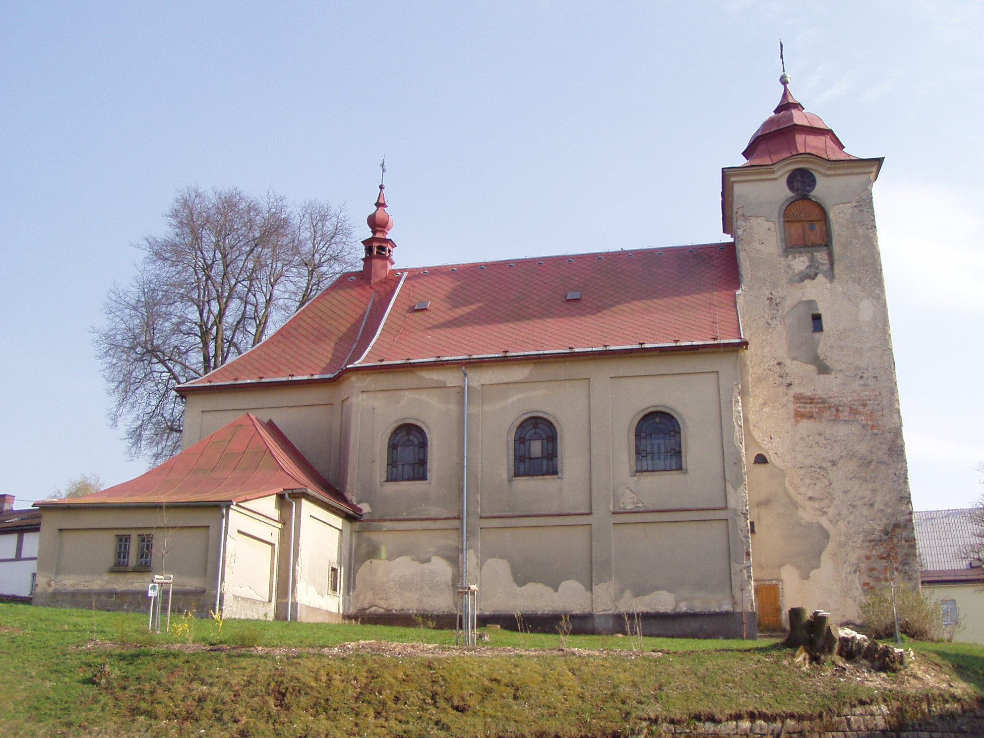 Kostel sv. Václava (Kocléřov)